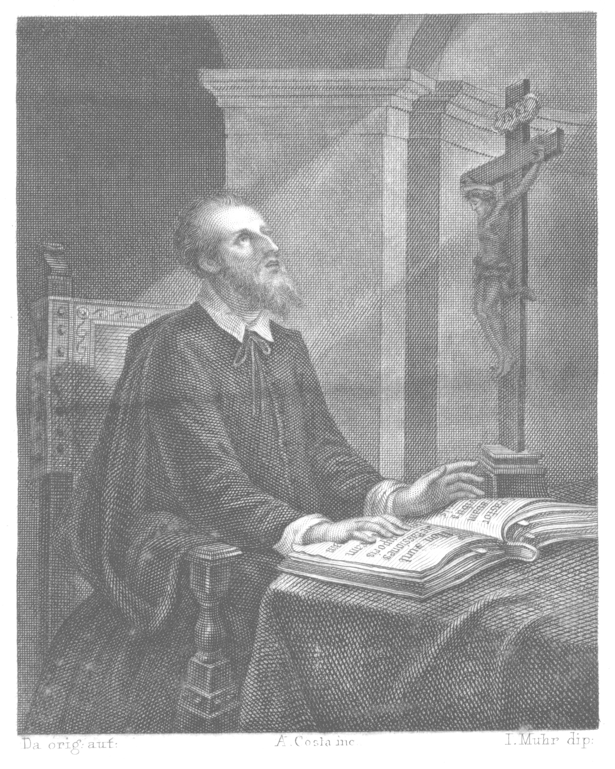 Della Vita e passione del veneralibile Servio di Dio Givanni Sarcander, Macerata 1855